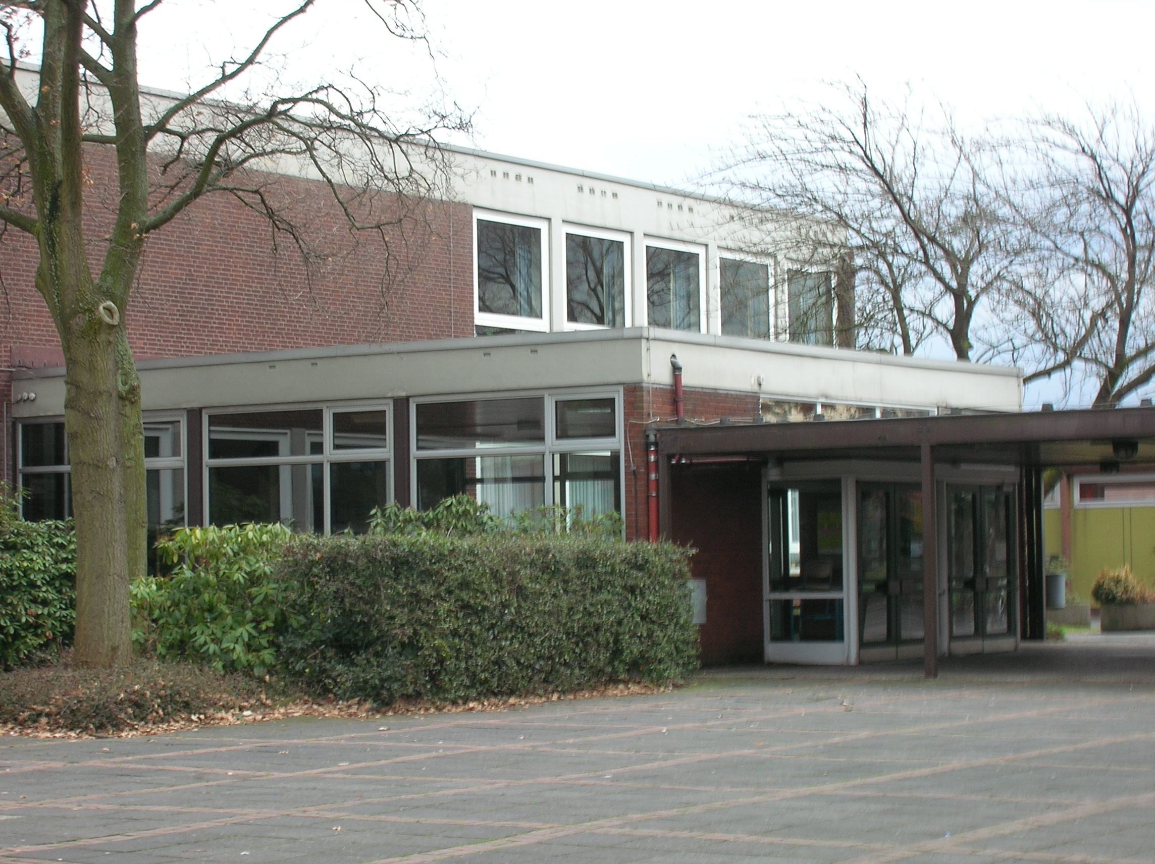 Eingangsbereich der Realschule Ascheberg Sonstiges: konnte kein anderres Bild machen nicht`s gut genug dafür!!!